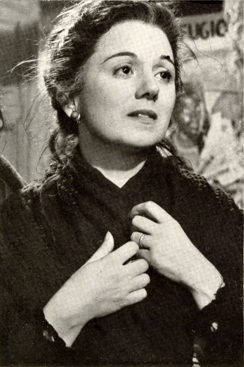 photo from Cineguida 1954